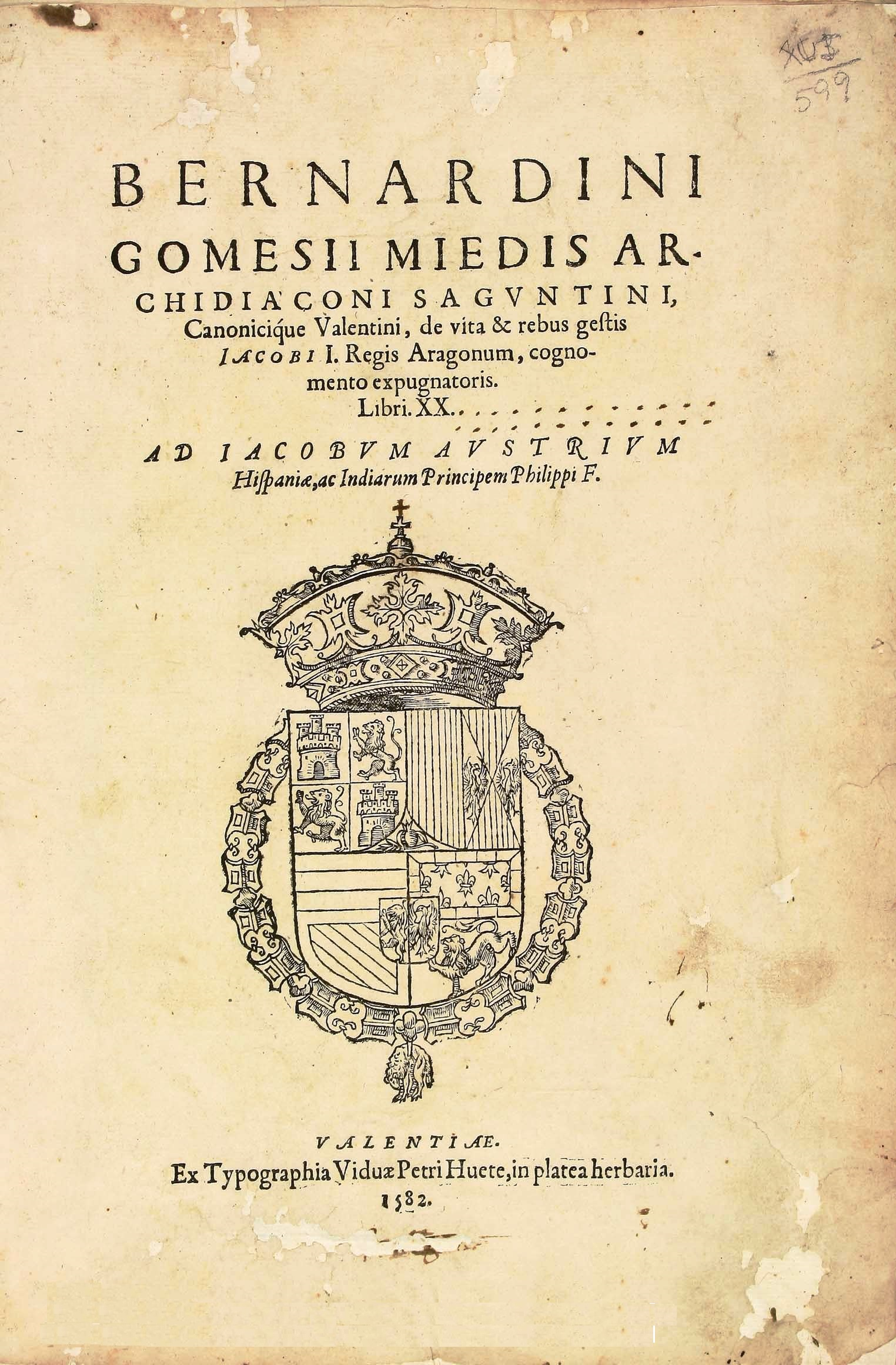 Portada de l'obra "De vita & rebus gestis Iacobi I Regis aragonum : cognomento expugnatoris libri XX" de Bernardino Gómez Miedes. Valentiae : ex typographia Viduae Petri Huete, 1582.